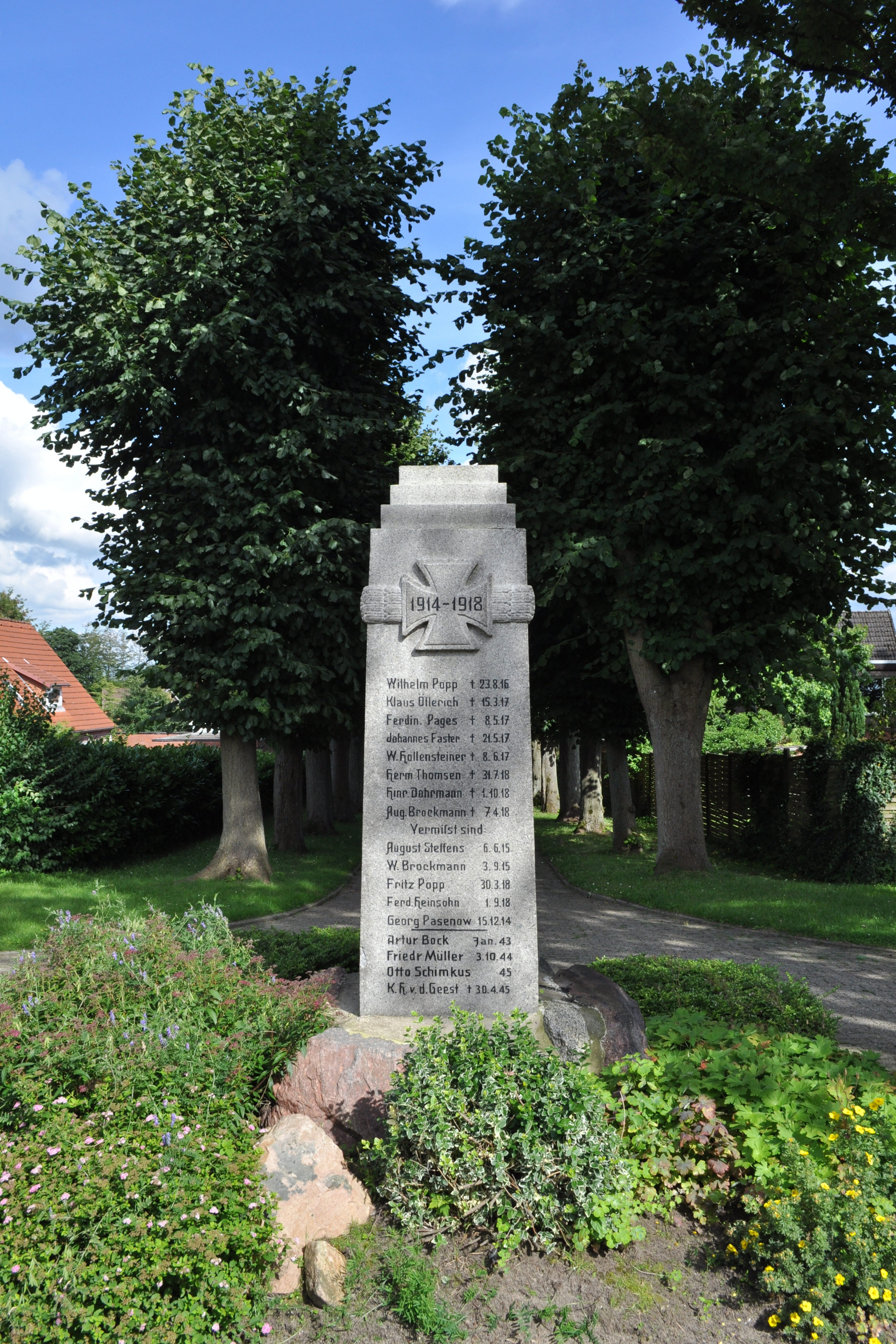 Kriegerdenkmal am Friedhof von Hemmoor-Althemmoor. This is a photograph of an architectural monument. .202.200.020